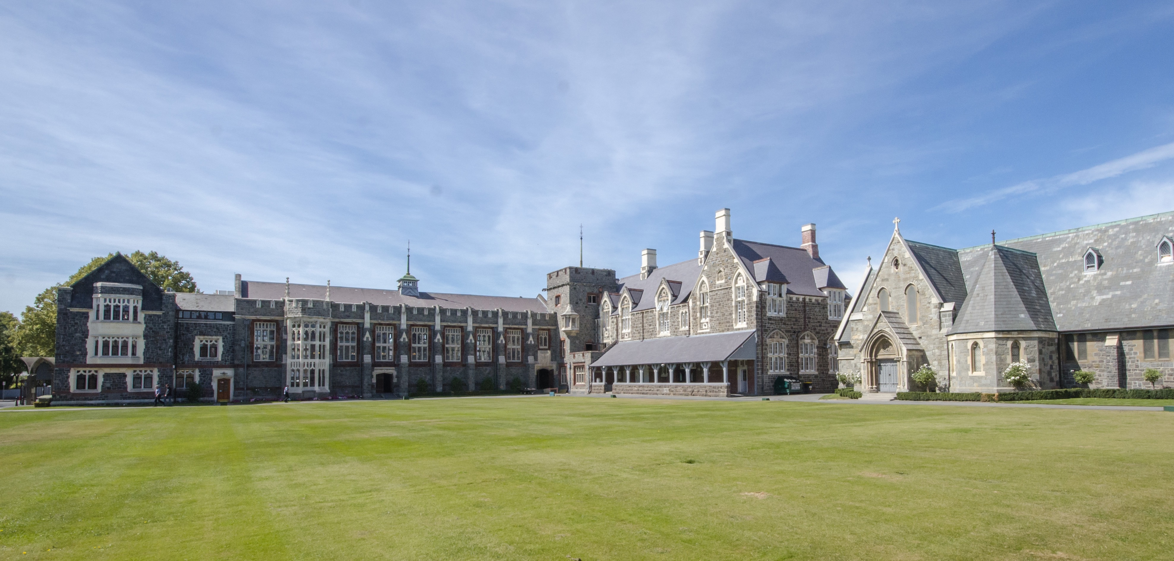 Christs College Campus 2016